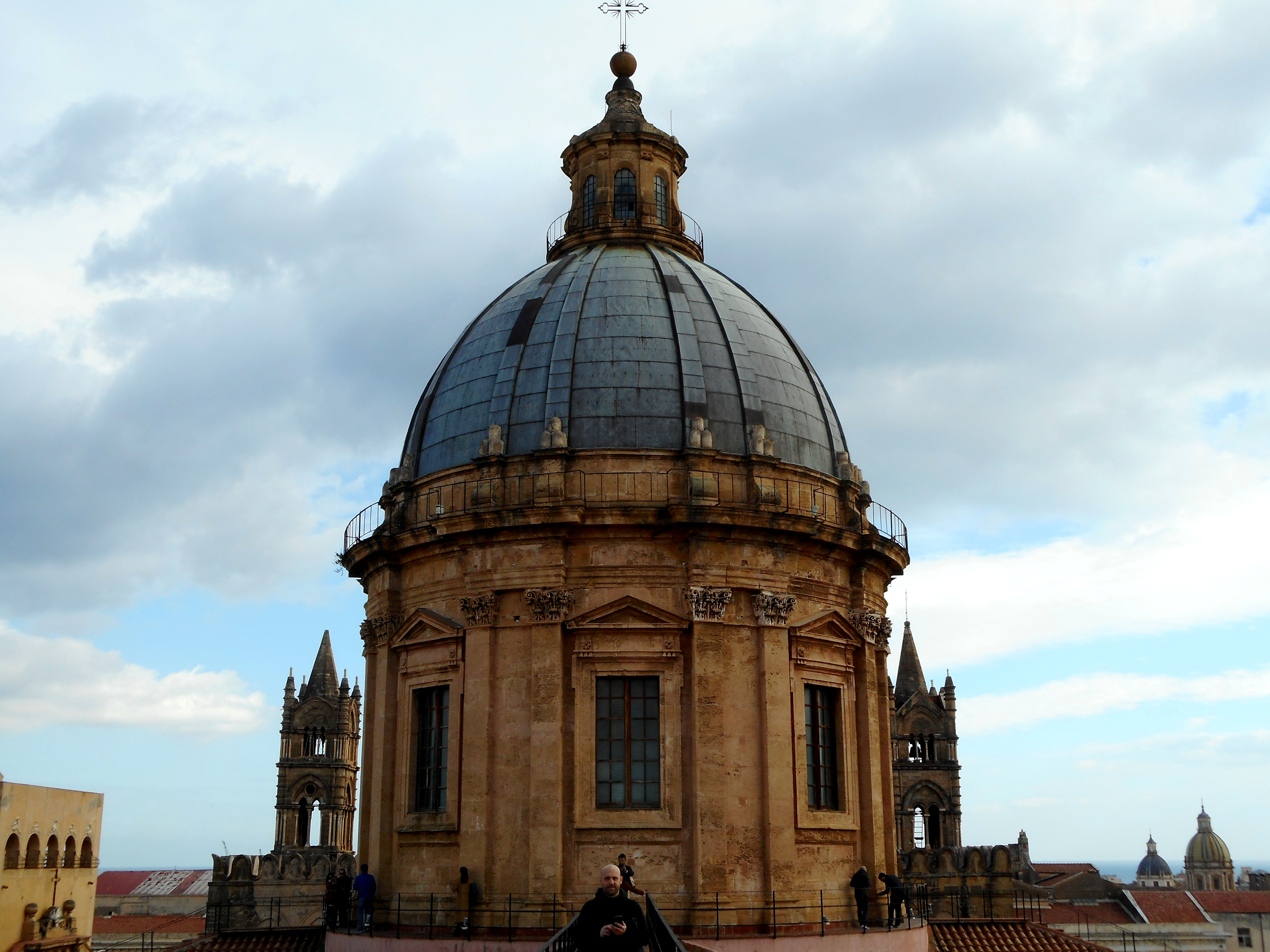 Cupola della Cattedrale di Palermo costruita da Ferdinando Fuga